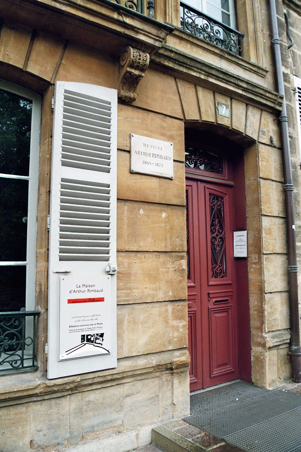 Charleville-Mézieres, Maison des Ailleurs, Maison òu vecut Rimbaud.